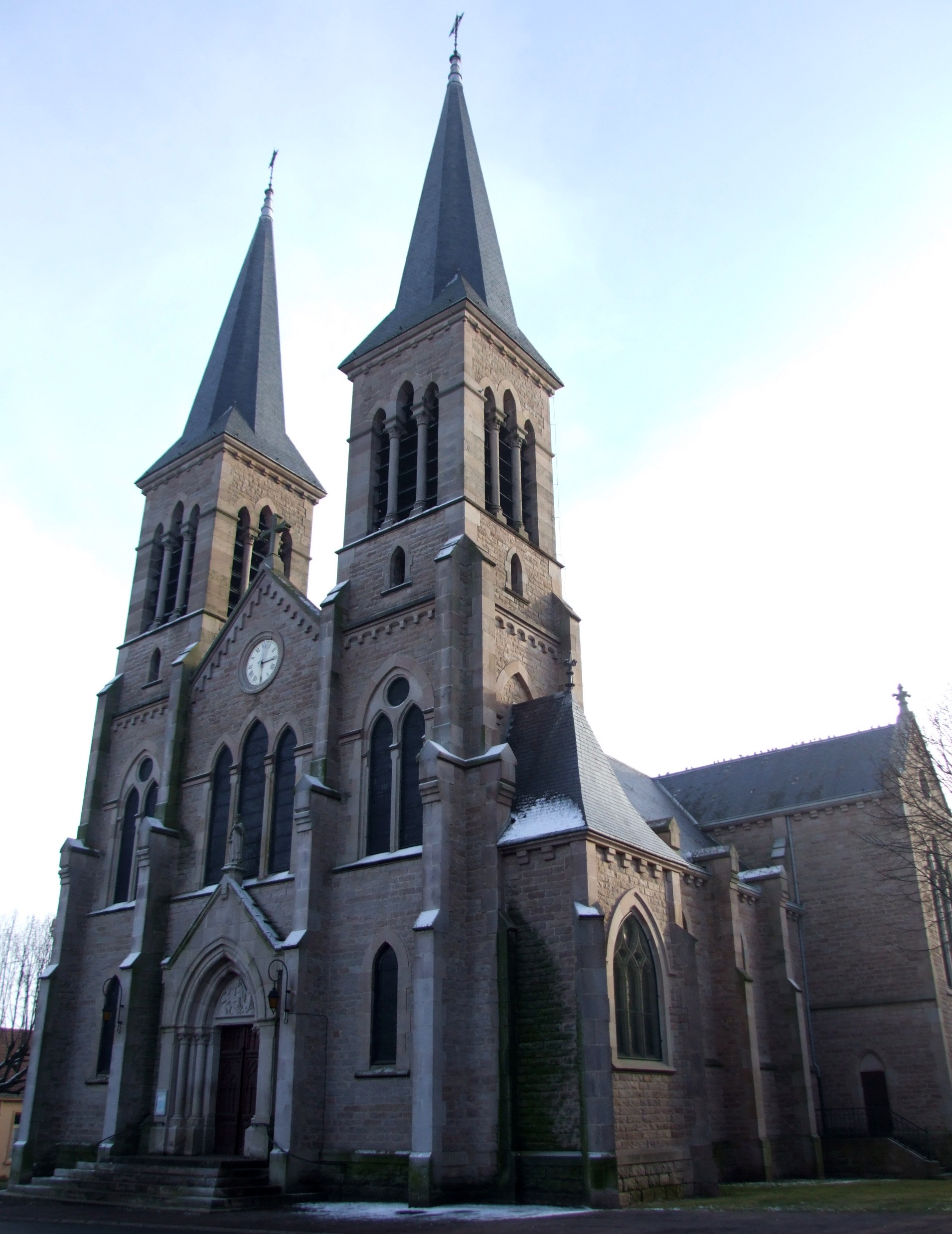 Église Saint-Henri, Le Creusot, Saône-et-Loire, Bourgogne, FRANCE